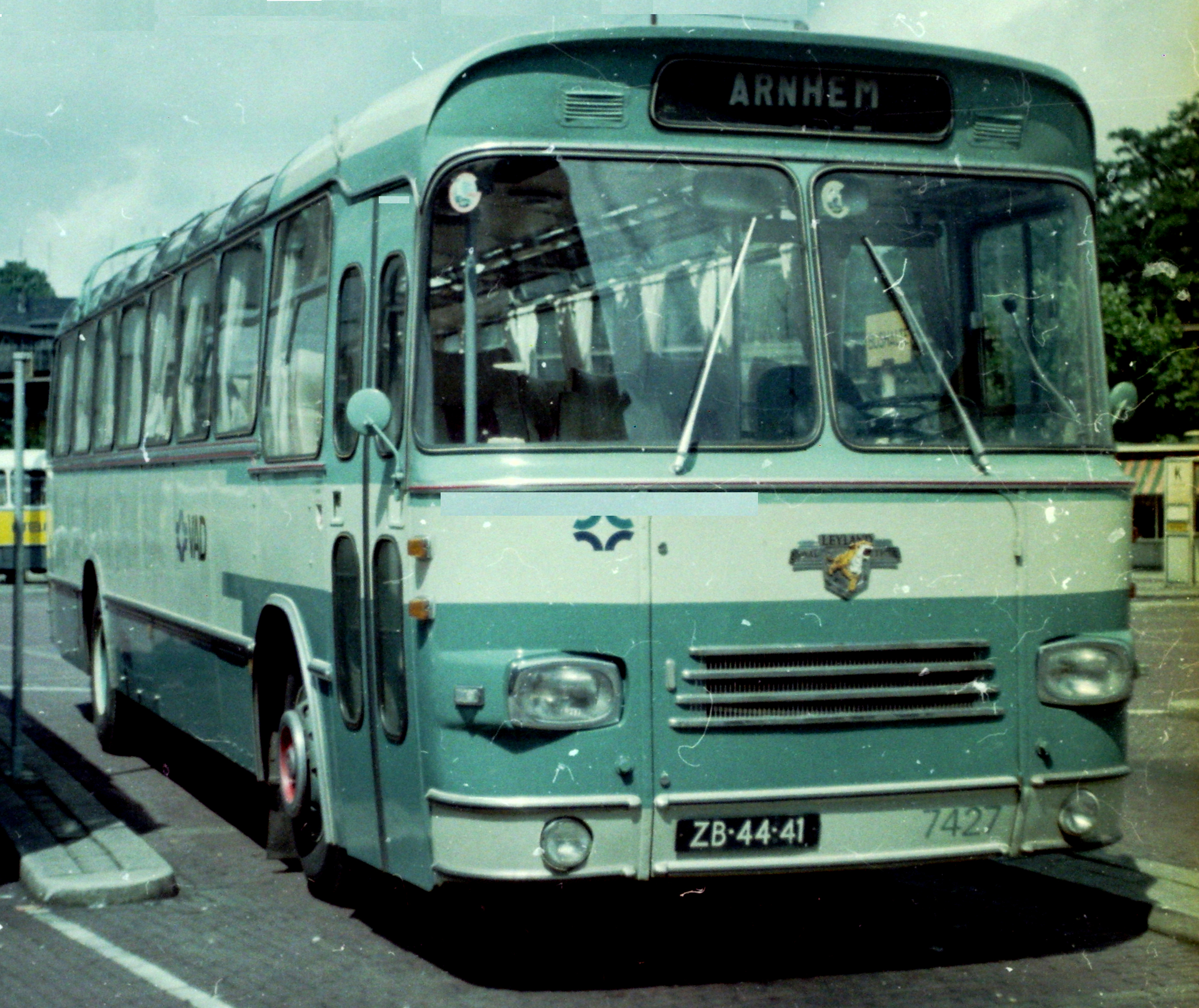 Veluwse Auto Dienst (VAD) bus 7427 van het type Hainje / Leyland-Werkspoor LE-WS te Arnhem.